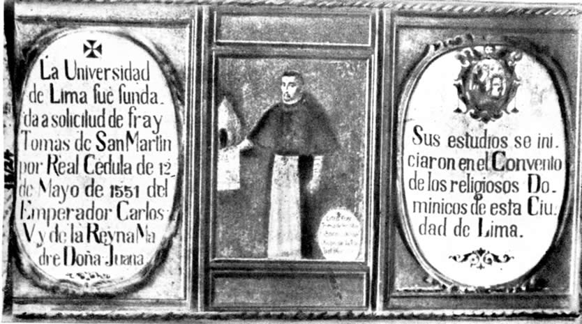 Óleo referente a la fundación de la Universidad de San Marcos y a fray Tomás de San Martín, O.P.